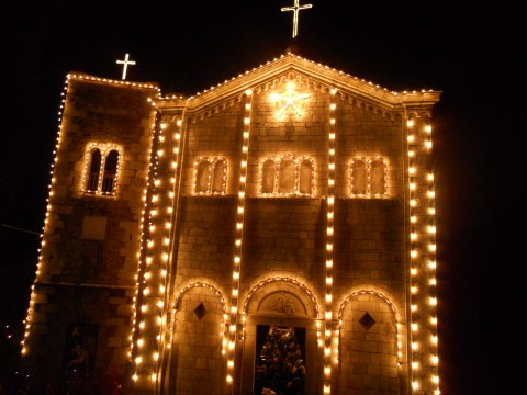 Il campanile e la chiesa di Retignano (Stazzema), illuminati in occasione della triennale religiosa "Gesù Morto".